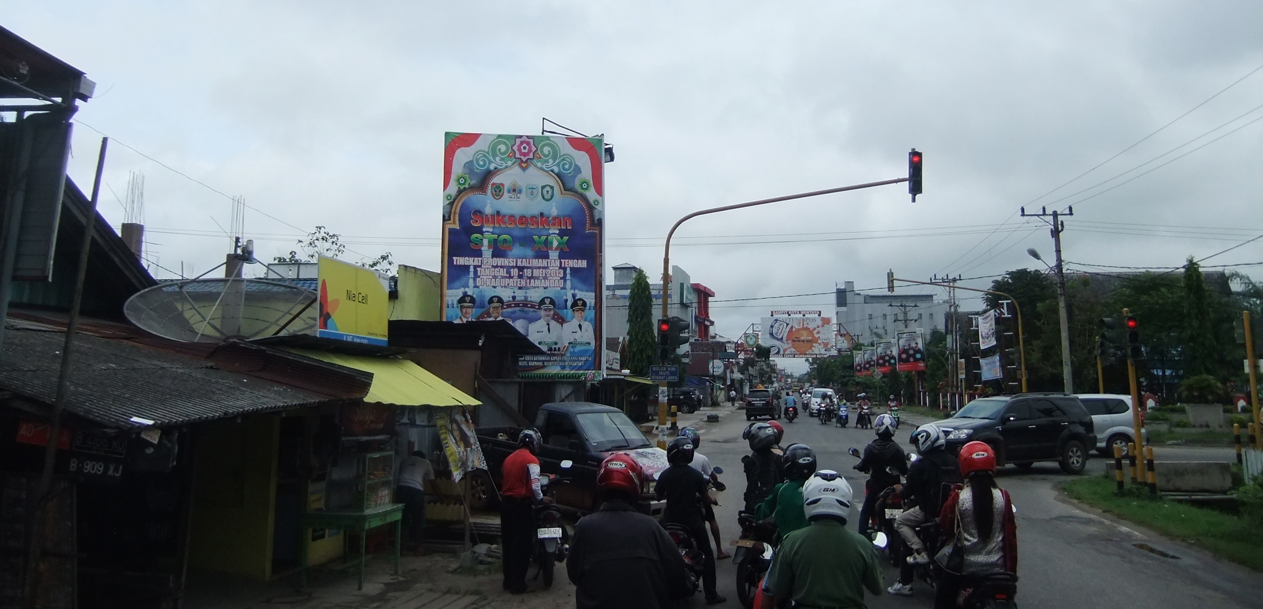 Jl MT Haryono Sampit, Kalimantan Tengah